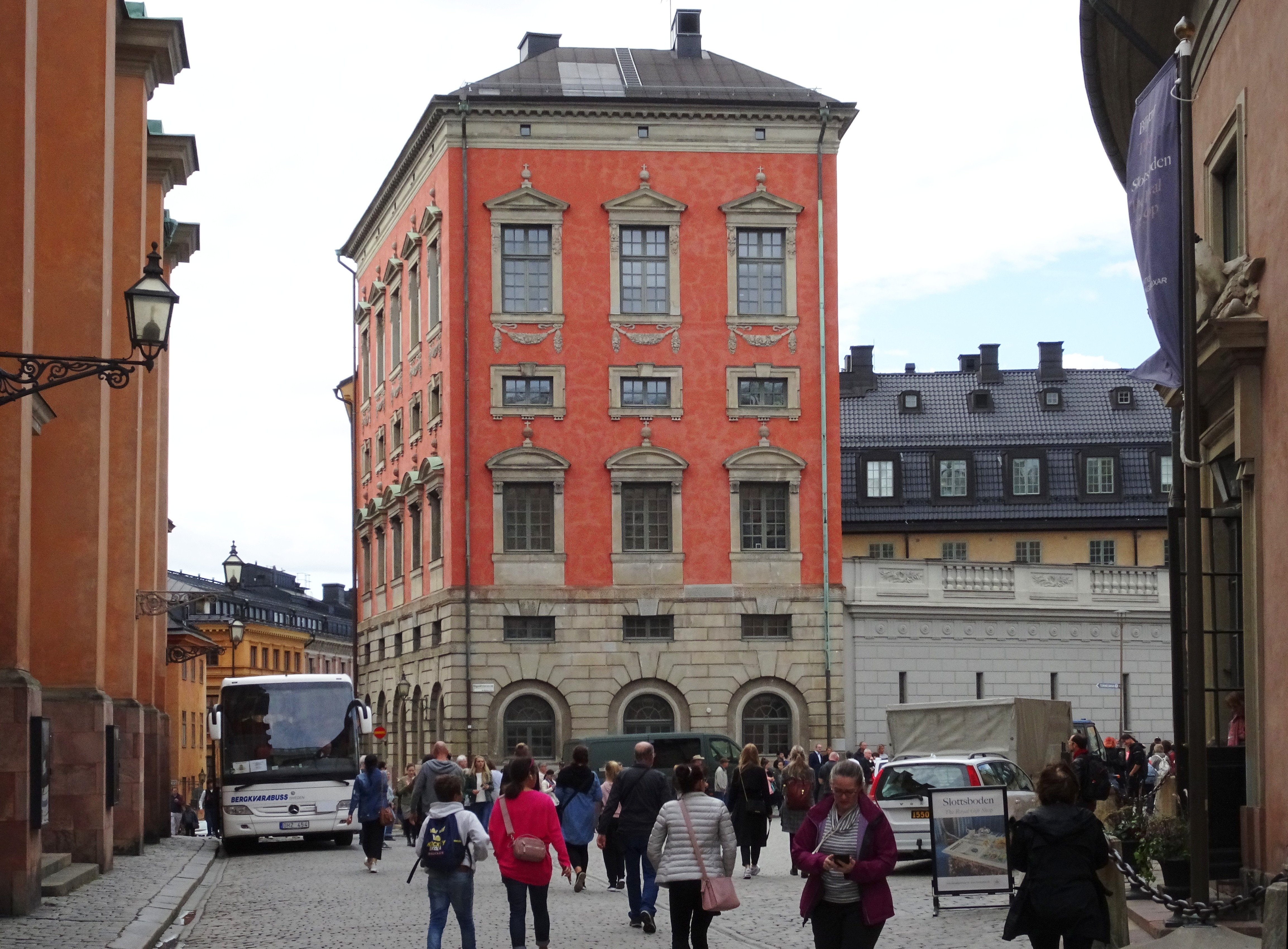 Axel Oxenstiernska palatset mot Högvaktsterrassen.